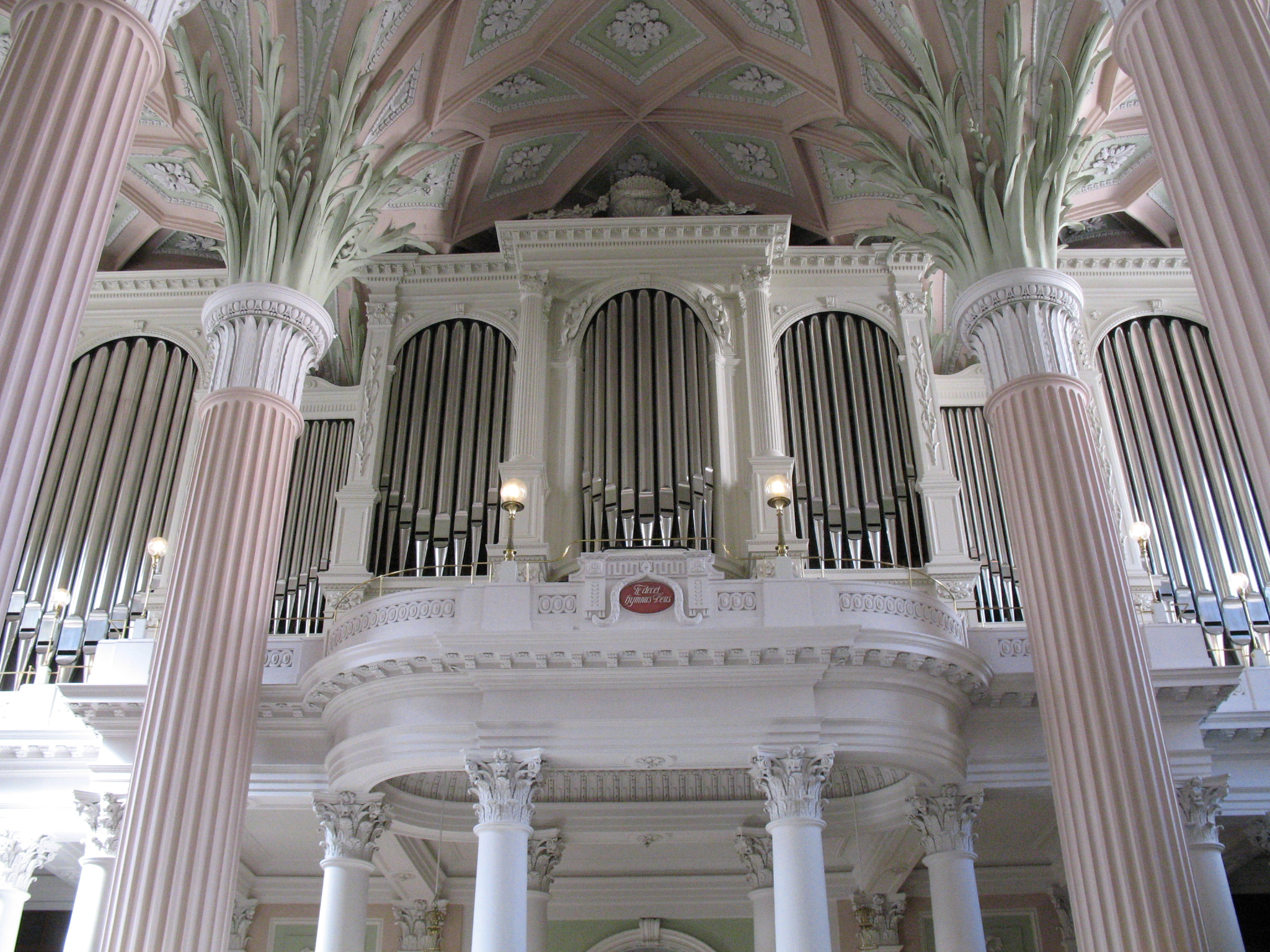 Orgel der Nikolaikirche in Leipzig